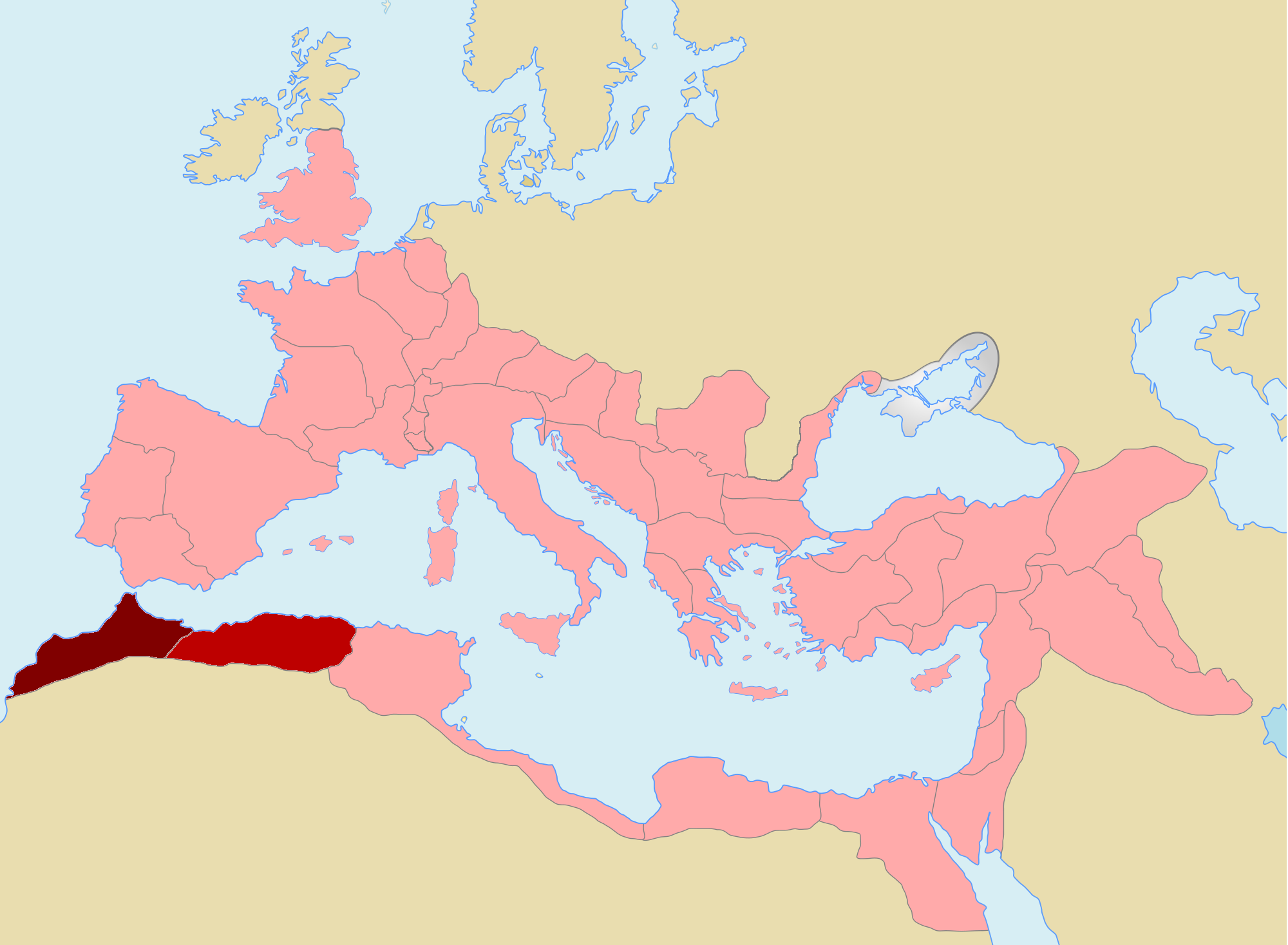 Mauretaniae